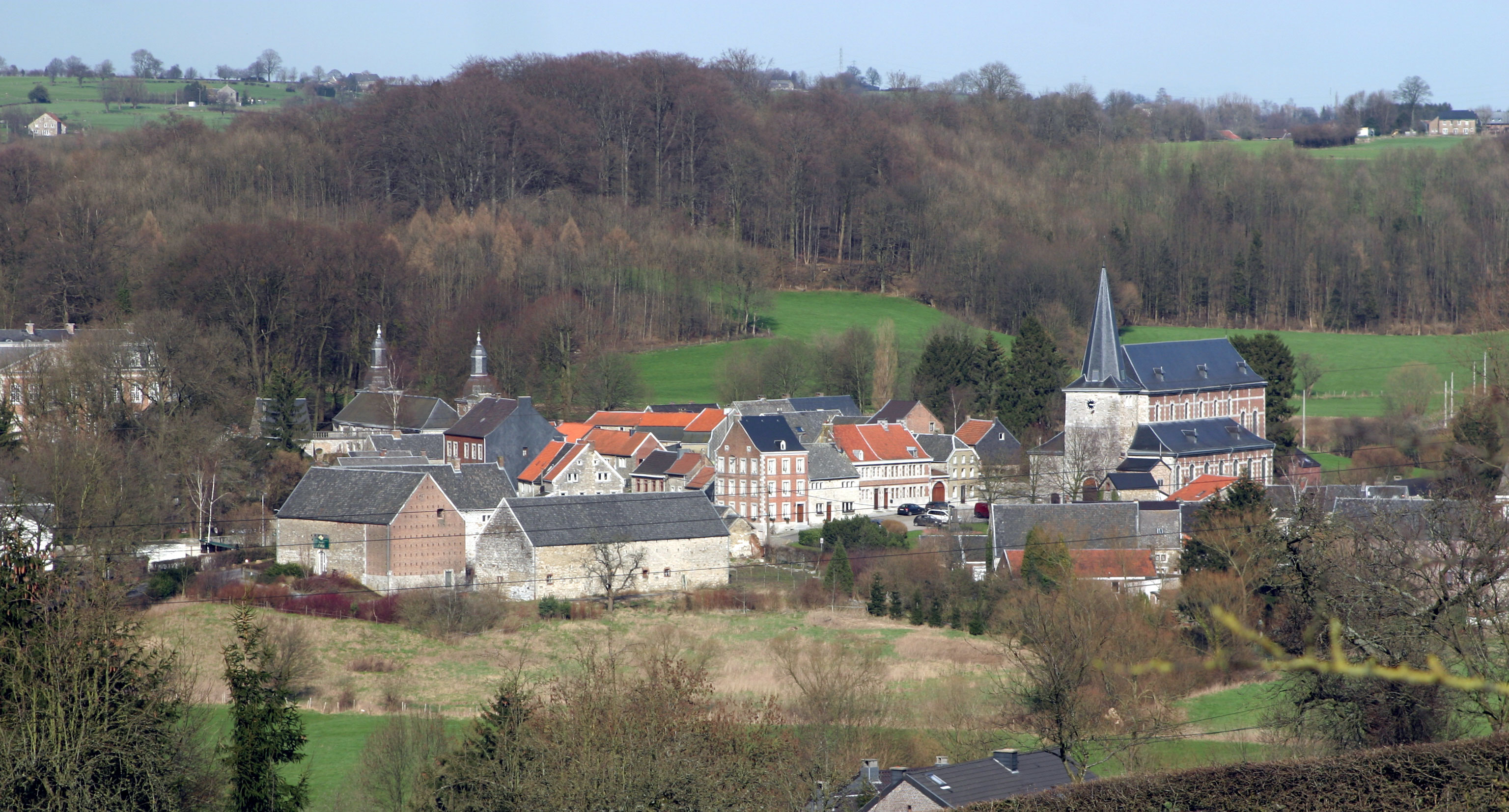 Soiron Duerf